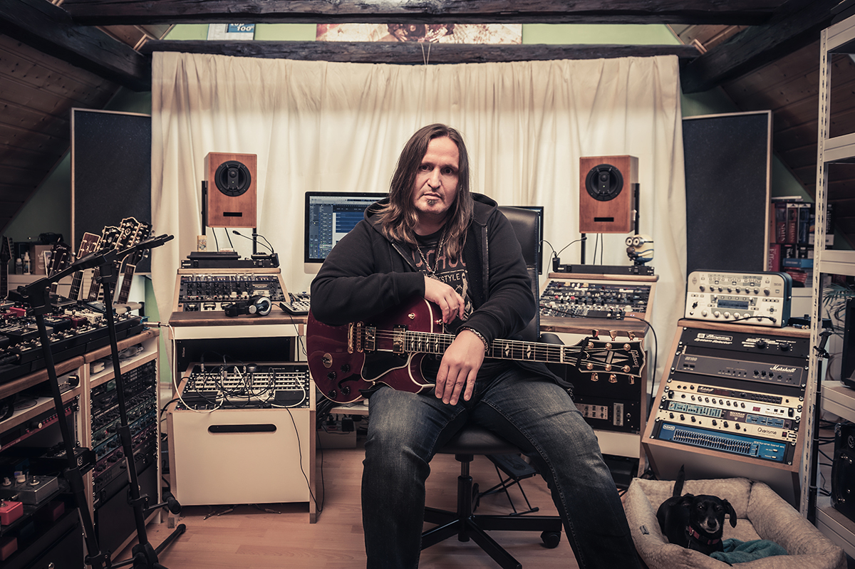 Jörg Wartmann in seinem Studio 2017